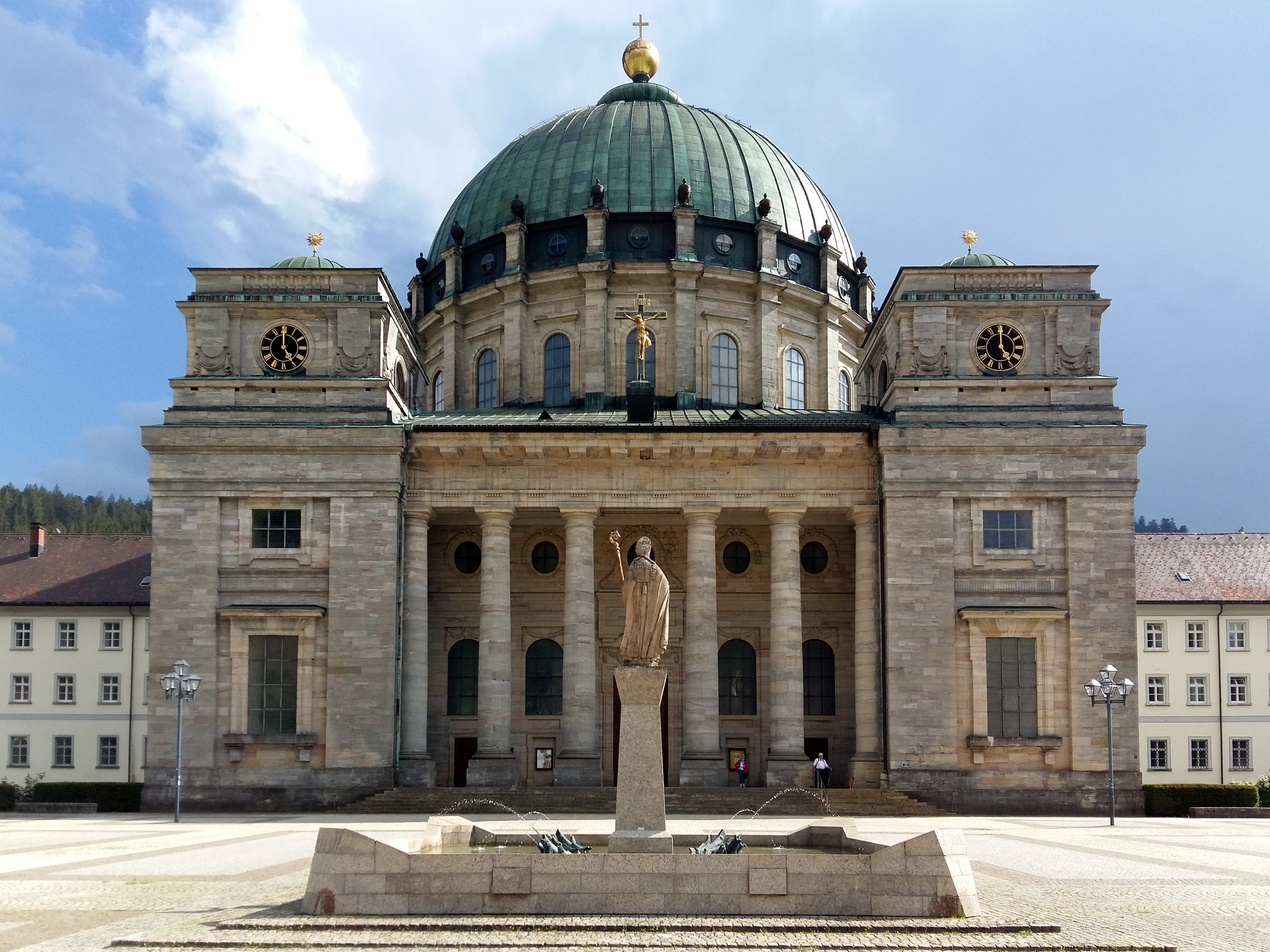 Die ehemalige Abteikirche des Klosters St. Blasien hat eine Gesamthöhe von 62 Metern und wurde 1783 eingeweiht.